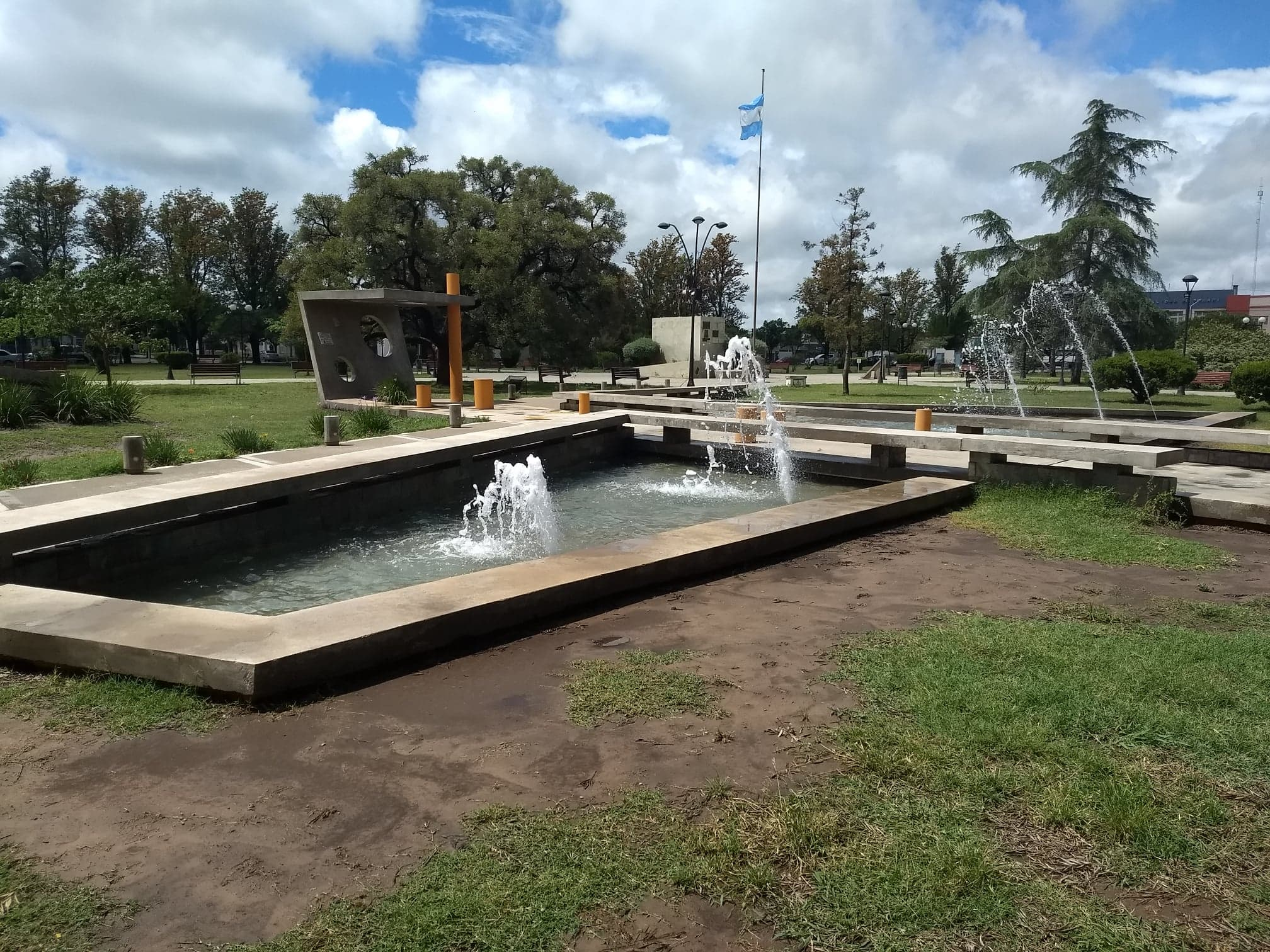 Nueva fuente en la Plaza San Martín de la localidad de Suardi.